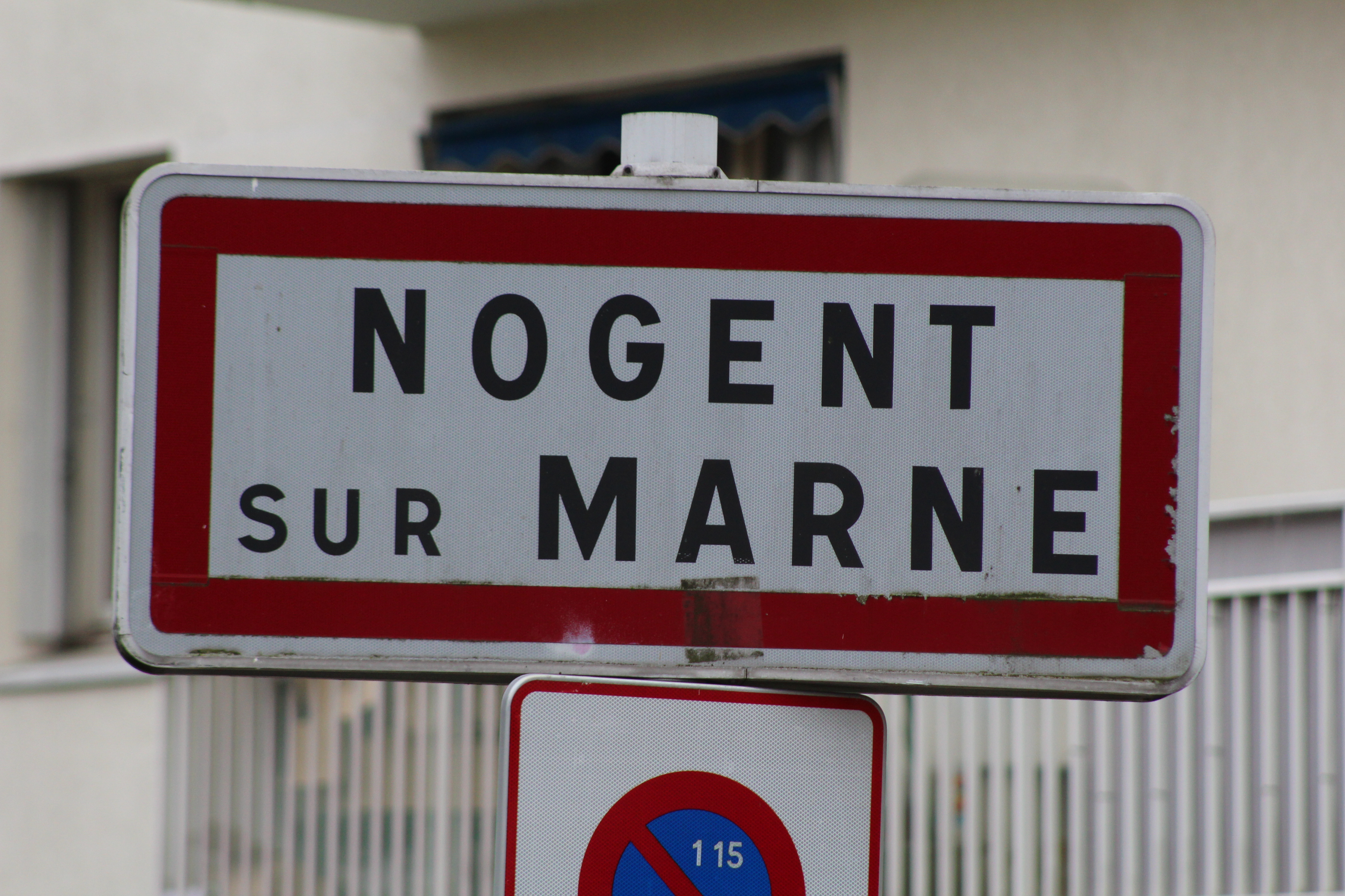 Panneau d'entrée dans Nogent-sur-Marne depuis Fontenay-sous-Bois.